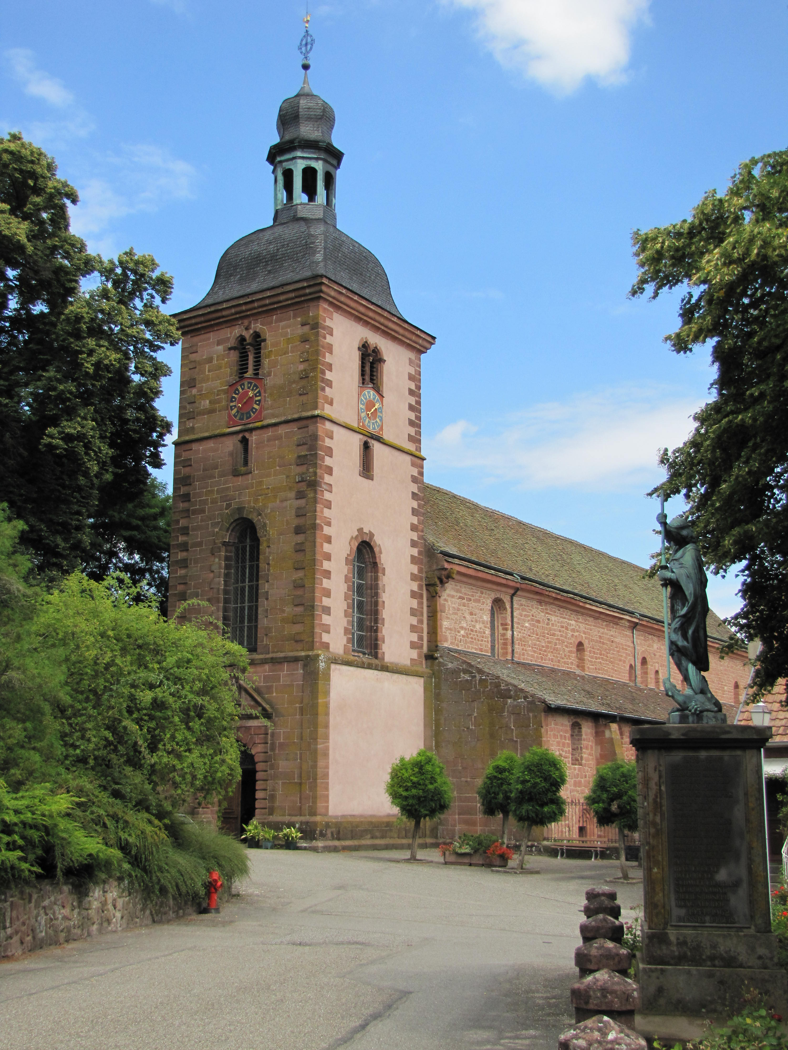 Alsace, Bas-Rhin, Saint-Jean-Saverne, Église abbatiale Saint-Jean-Baptiste (PA00084921, IA00055618).